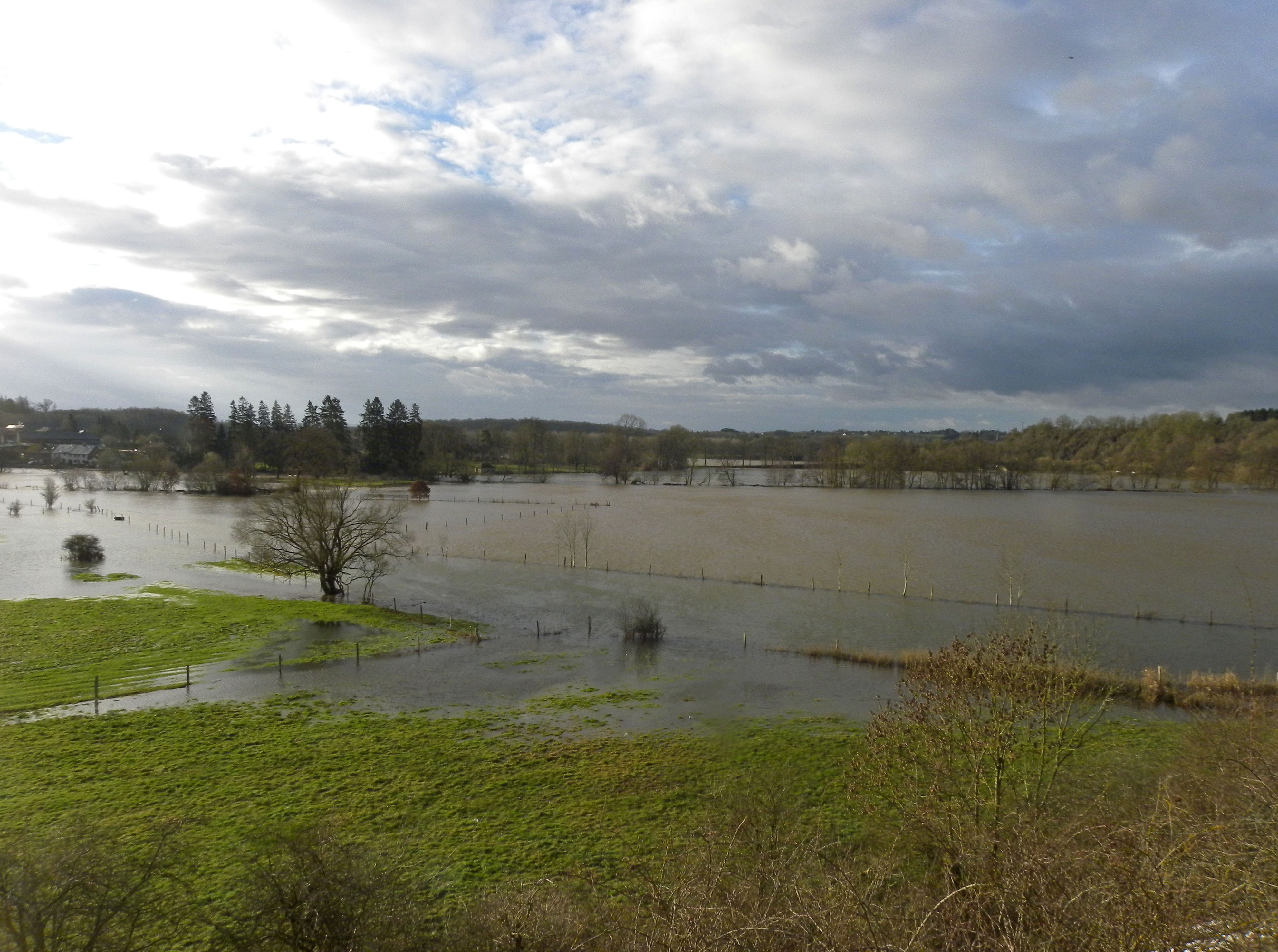 NOISEUX